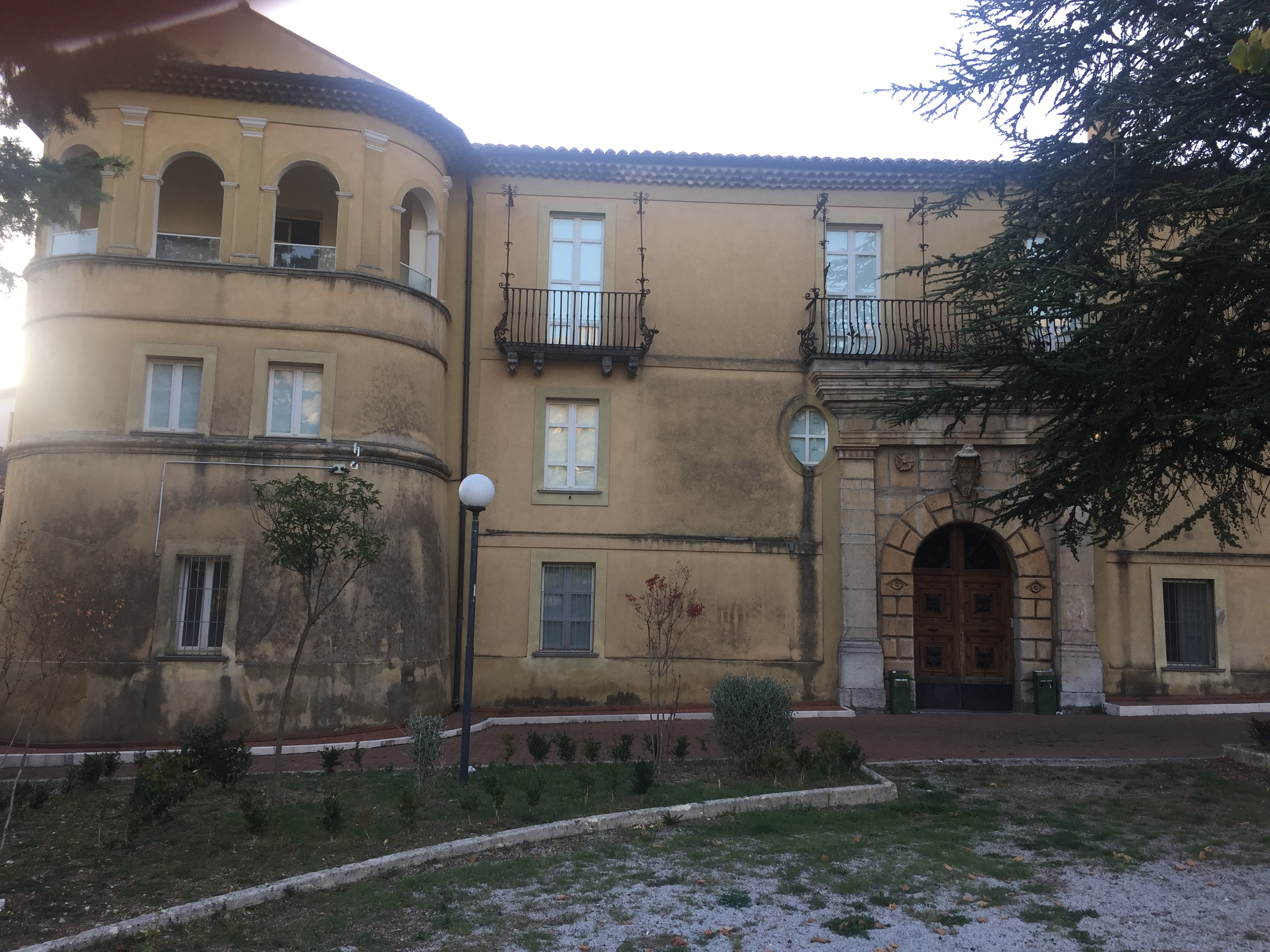 Palazzo Corrado Museo